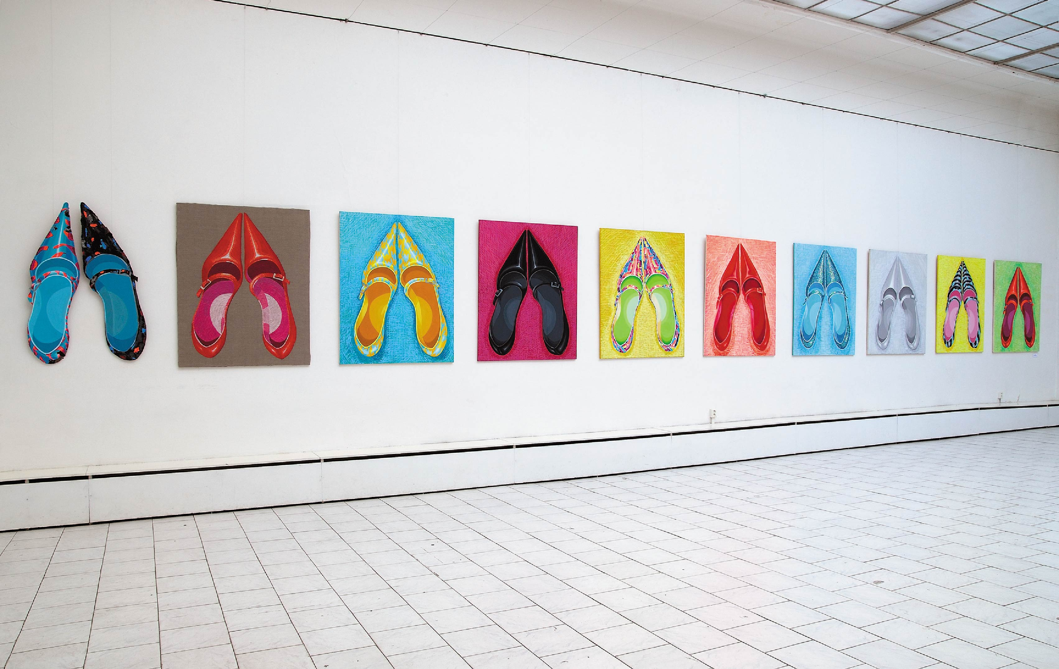 Instalace obrazů od Xénie Hoffmeisterové